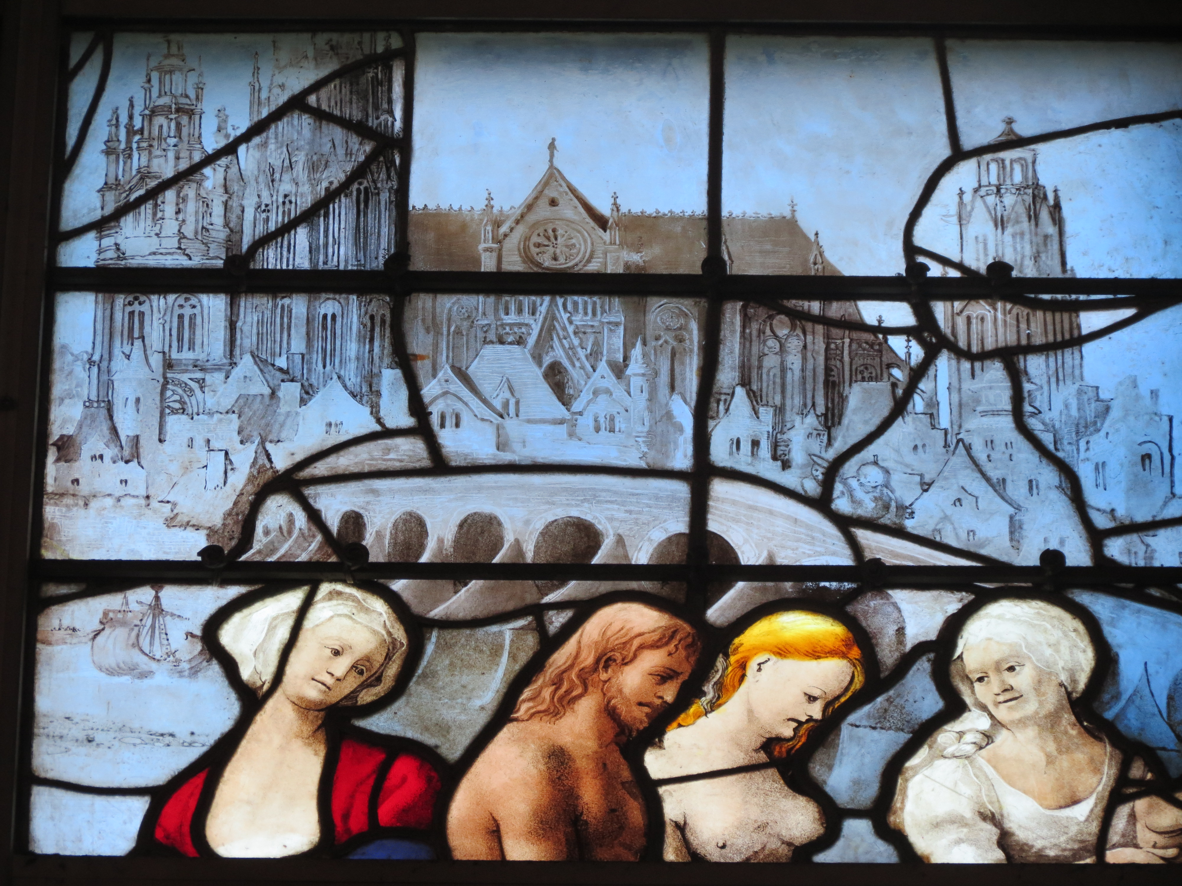 Détail d'un vitrail de l'église Sainte-Jeanne-d'Arc représentant la cathédrale de Beauvais.